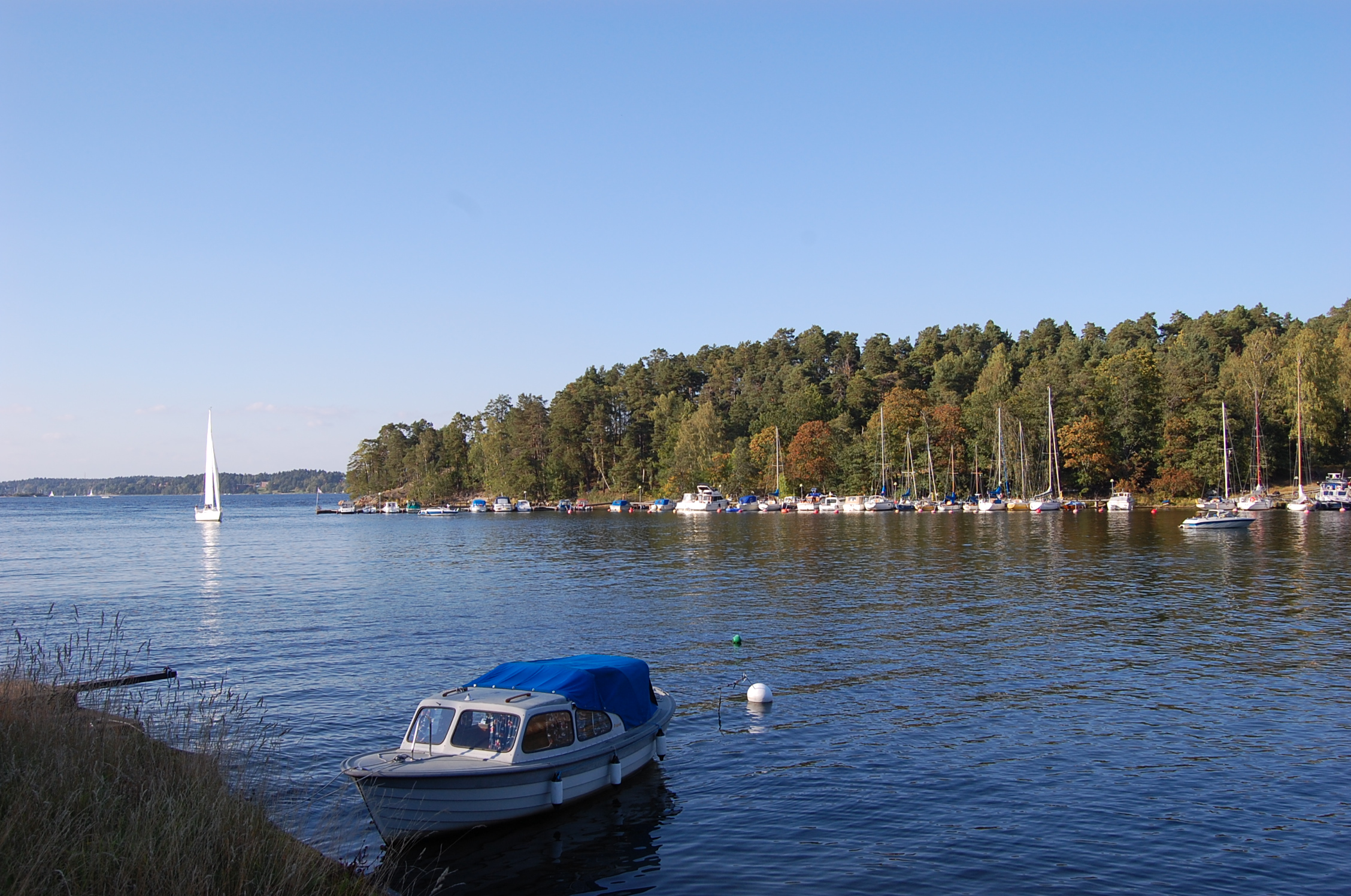 Gärdesudden sedd från söder/Lövbergabacken